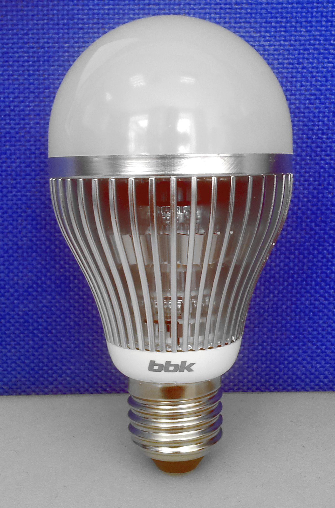 Светодиодная лампа A1004F под стандартный патрон E27, 10 Вт, 4500 К